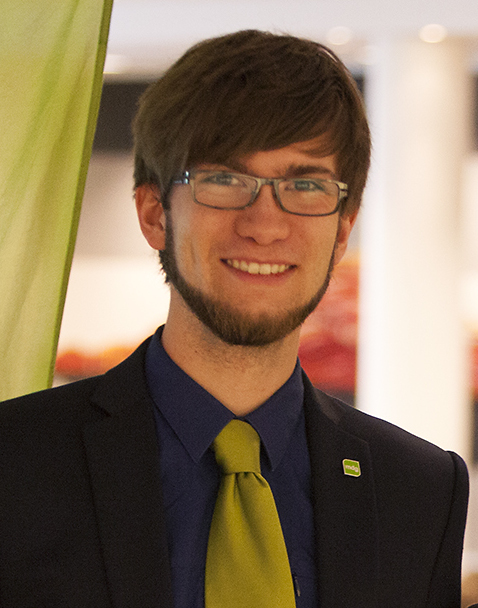 Lage Nøst, talsperson i Grønn Ungdom